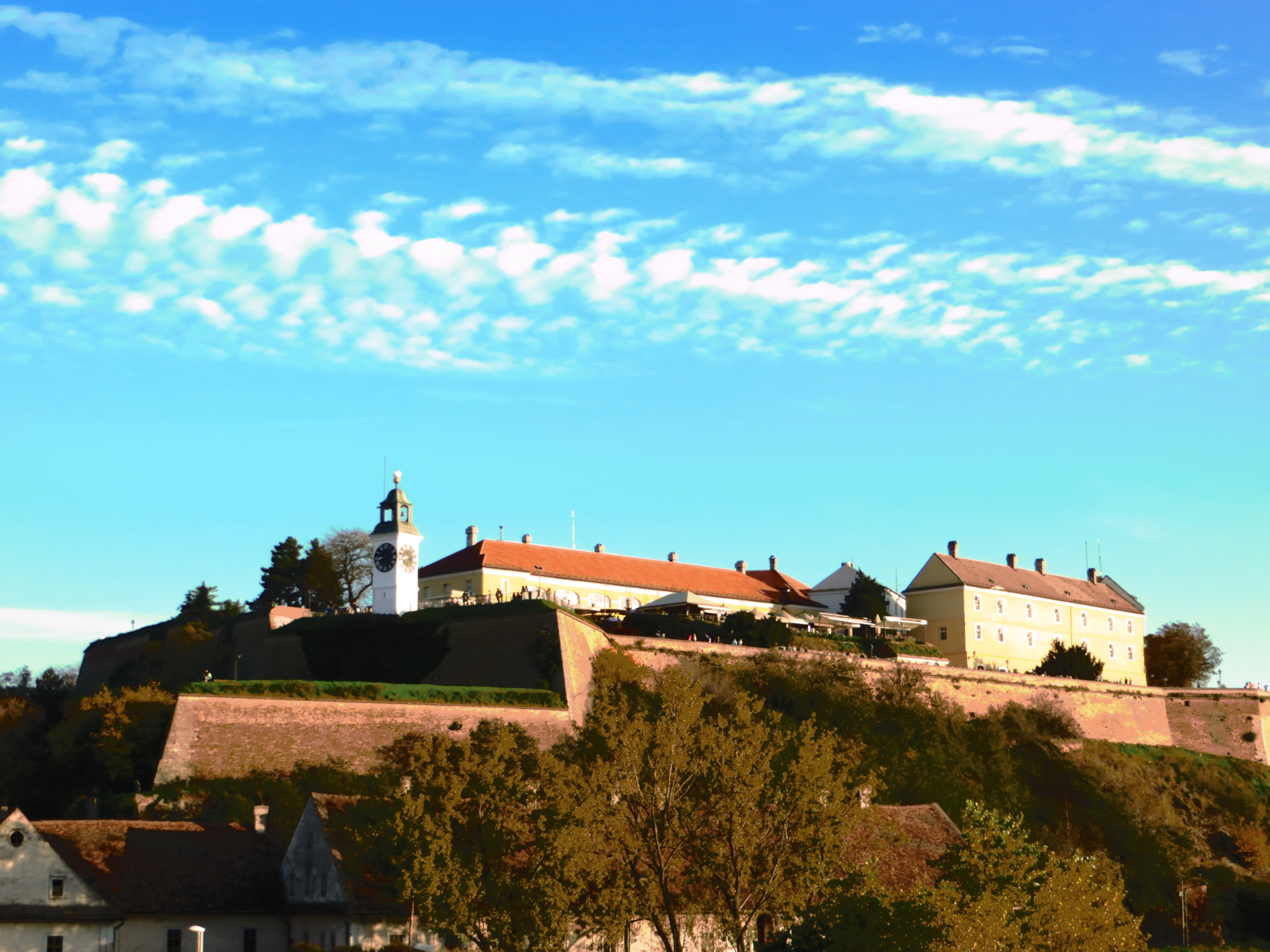 Petovaradinska tvrđva